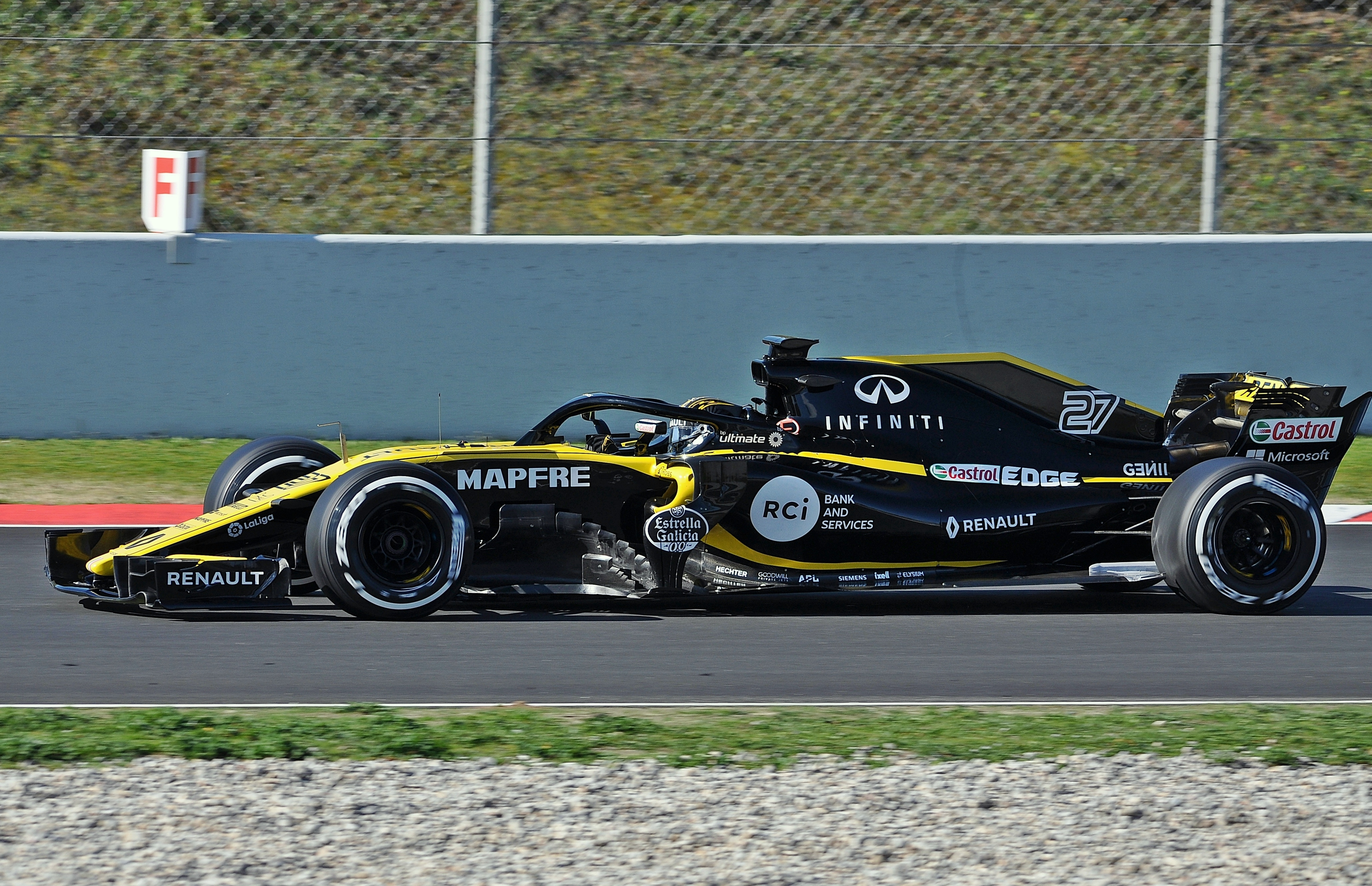 Renault RS18